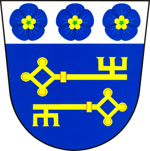 znak, Truskovice, okres Strakonice